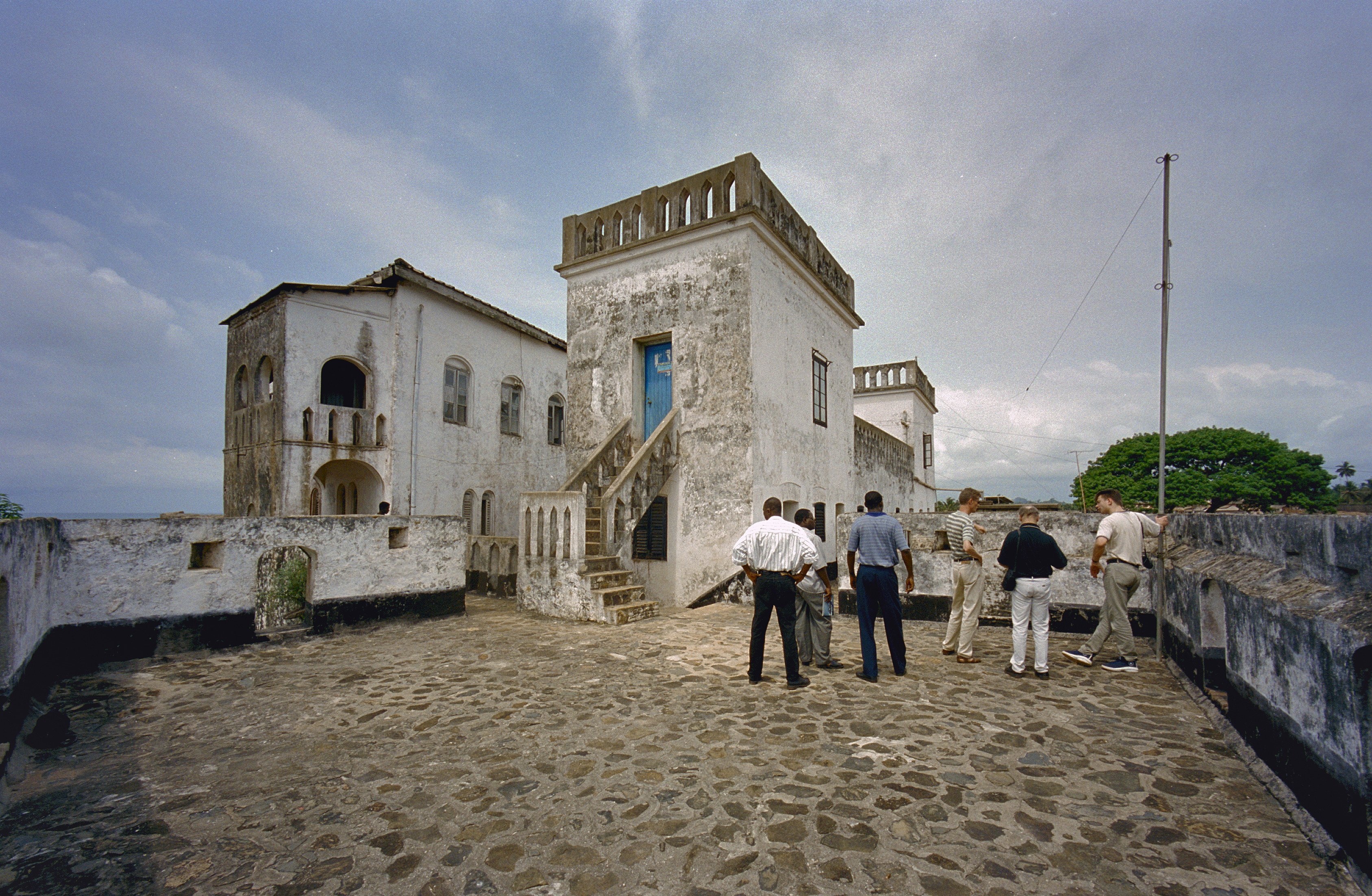 Fort Saint Anthony: Overzicht bovenop bastion rechts voor met zicht op beide hoger gelegen bouwdelen (opmerking: Ghana reis Loek Tangel)